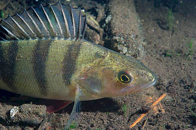 Met toestemming fotograaf: Ron Offermans Categorie:Afbeelding vis